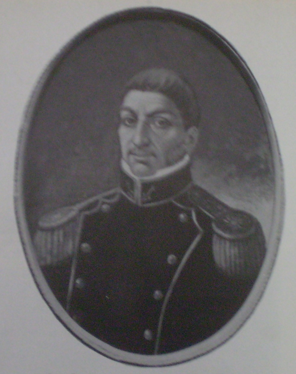 Jaun Bautista Azopardo